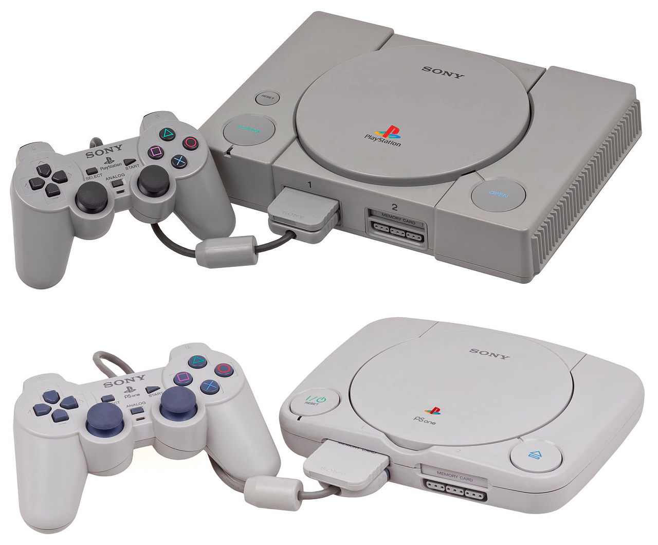 A PlayStation PSX és PSone változata